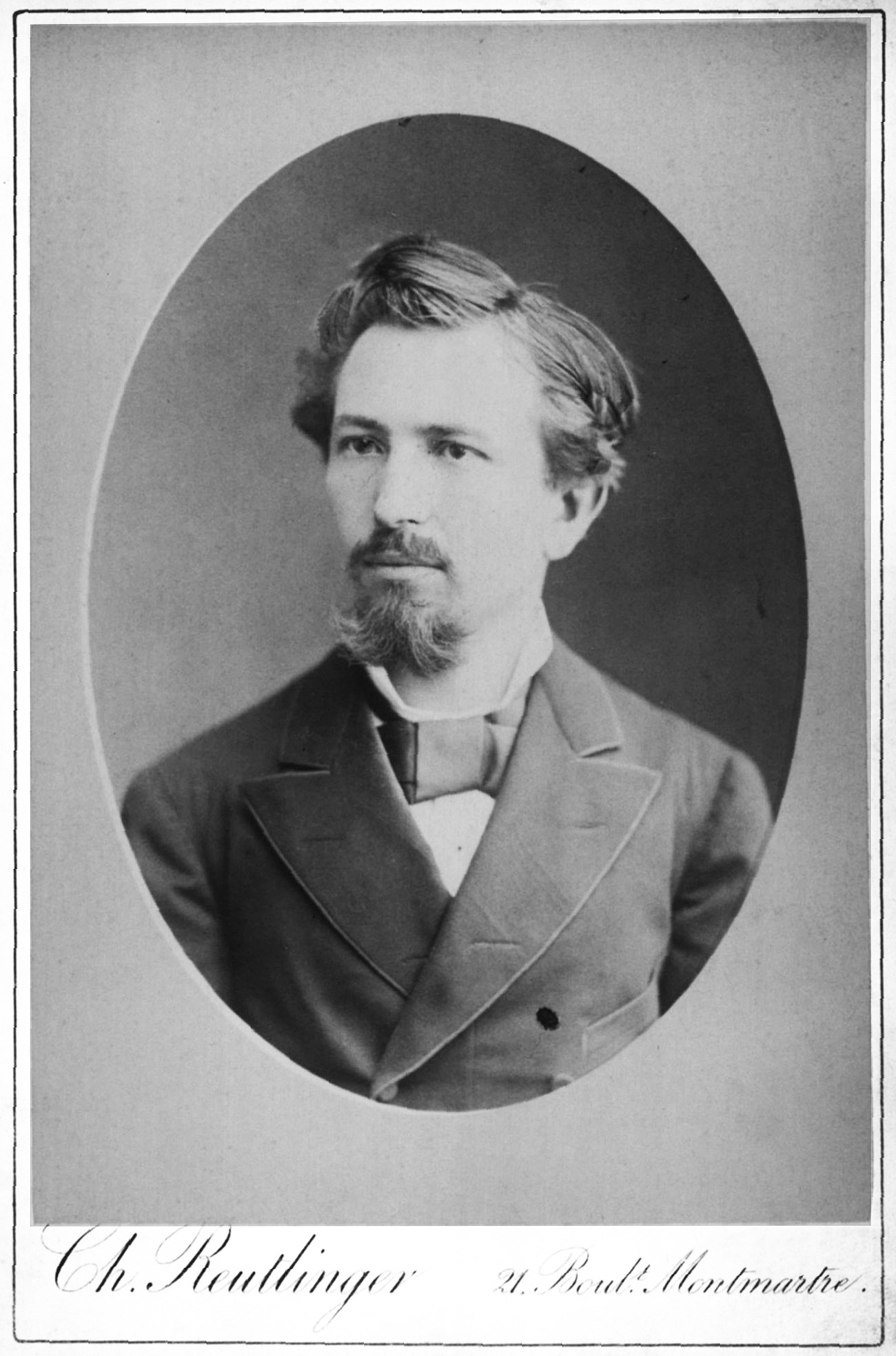 Der Architekt Paul Lange (1853–1932), ca. 1878 in Paris fotografiert